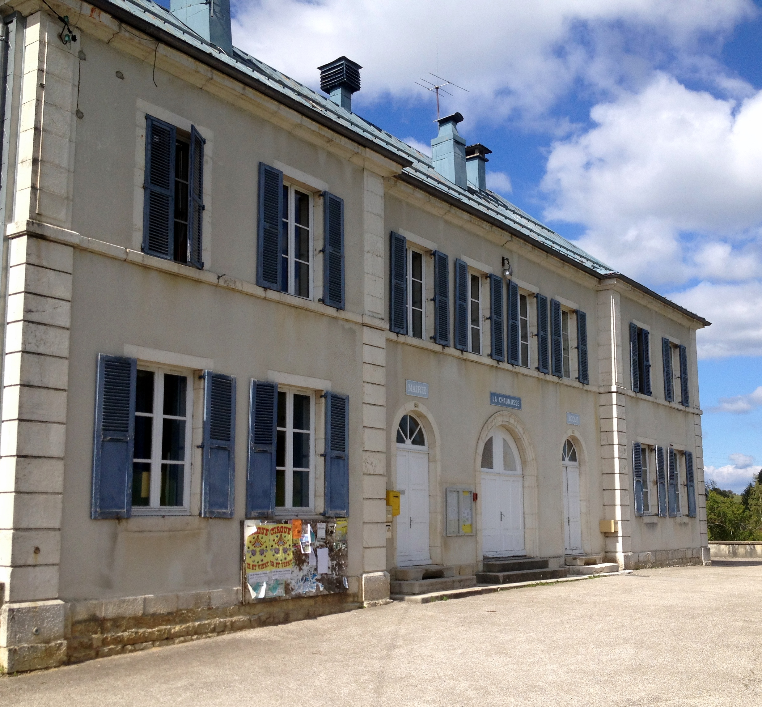 La Chaumusse, Jura, France.